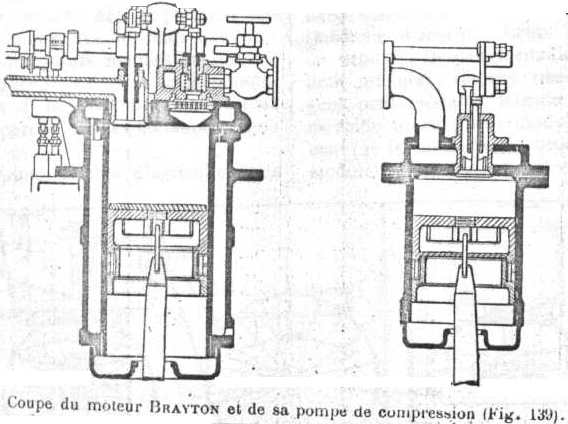 Moteur de George Brayton, un ancètre du moteur Diesel.